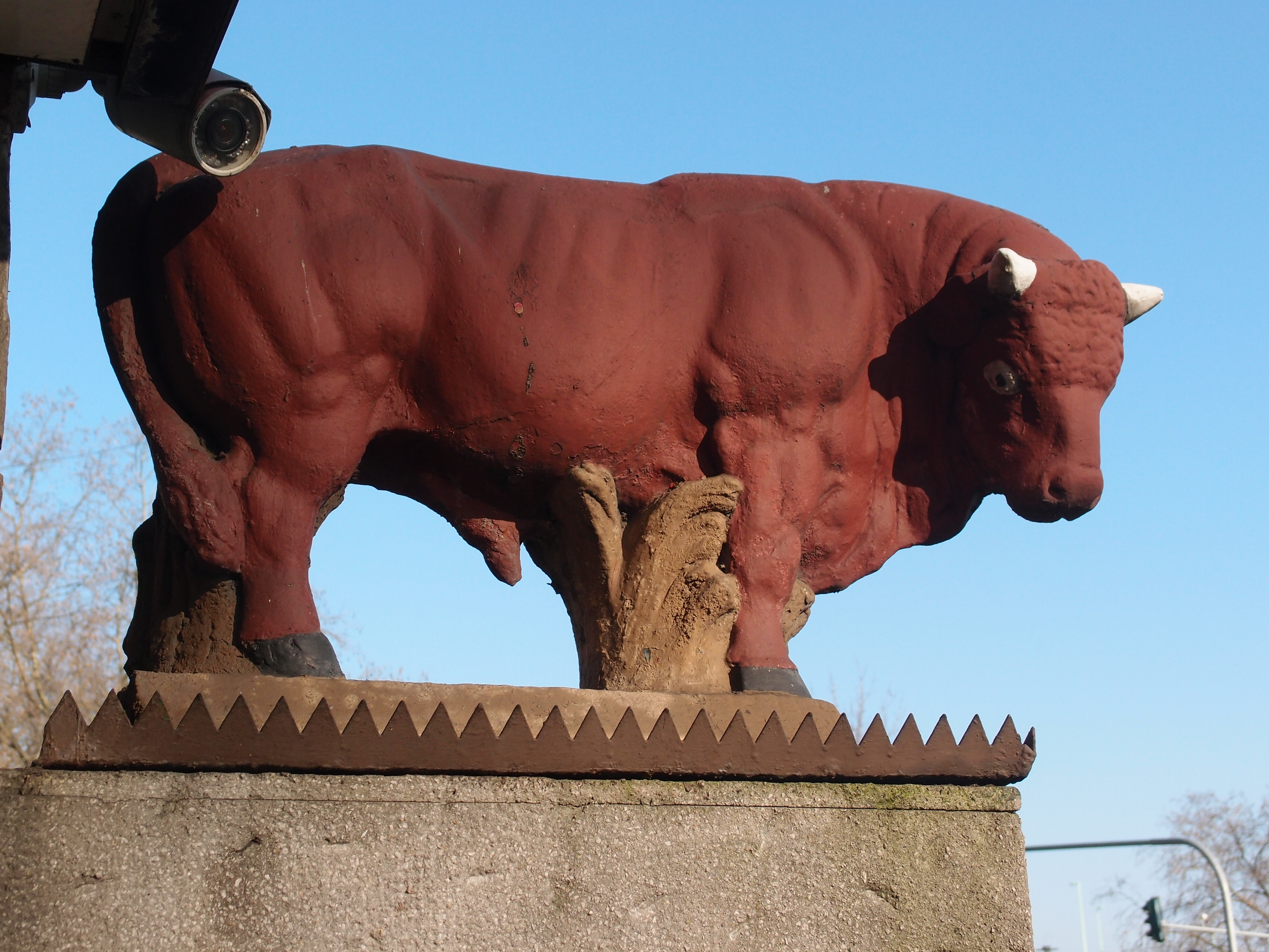 Brauhaus Im Roten Ochsen (seit 1798), Detail